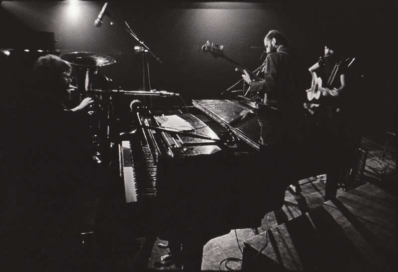 ASPM na Vokalíze 1983, zleva: Jan Spálený, Jiří Veselý a Petr Kalandra